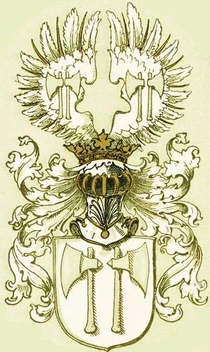 Das Wappen des hessischen Adelsgeschlechtes von Zabern (zu beachten die Nähe zum Wappen der von Habern). Grafik mit farblich hervorgehobener Helmkrone.